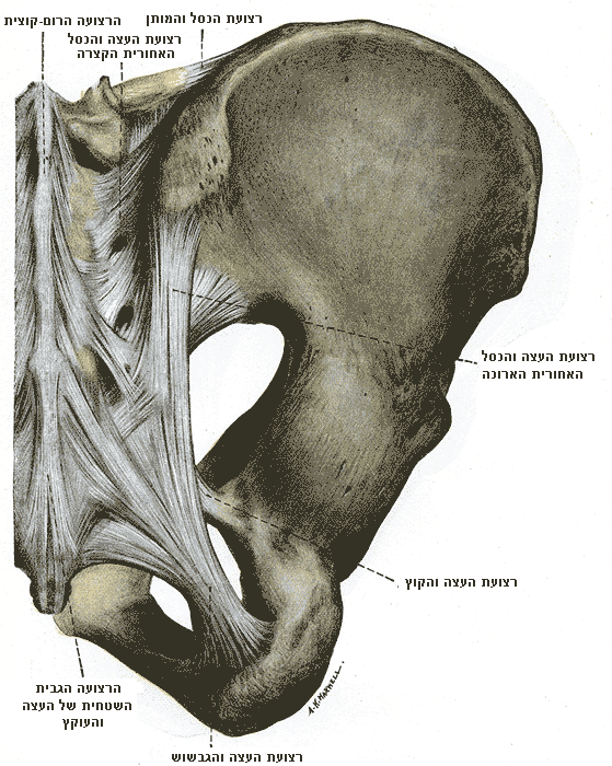 מפרקי האגן, מבט אחורי